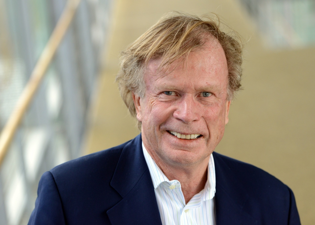 Porträtfotografie von Prof. Dr. Bruno Reichart